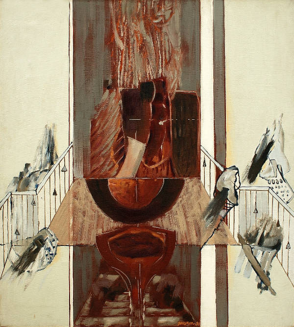 Prag, 1980, ulei pe pânză, 90x60 cm